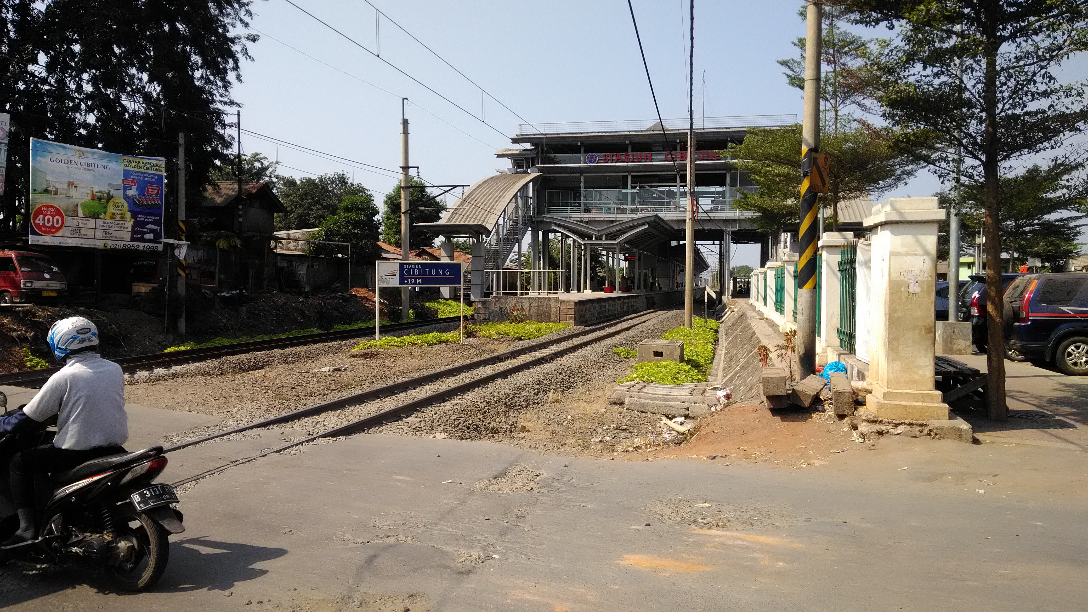 Stasiun Cibitung, 2019